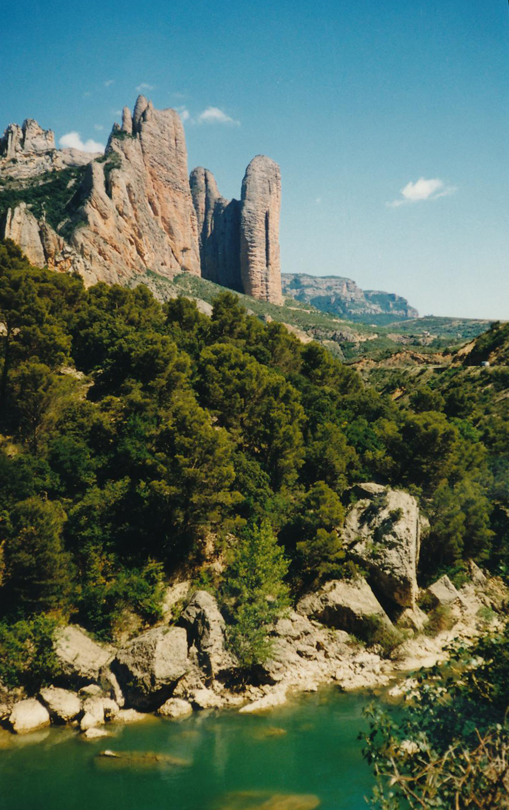 Felsformation "Los Mallos de Riglos" in der Provinz Huesca Datum: 06/1989 Urheber: Michael Pfeiffer Quelle: privates Fotoalbum des Urhebers